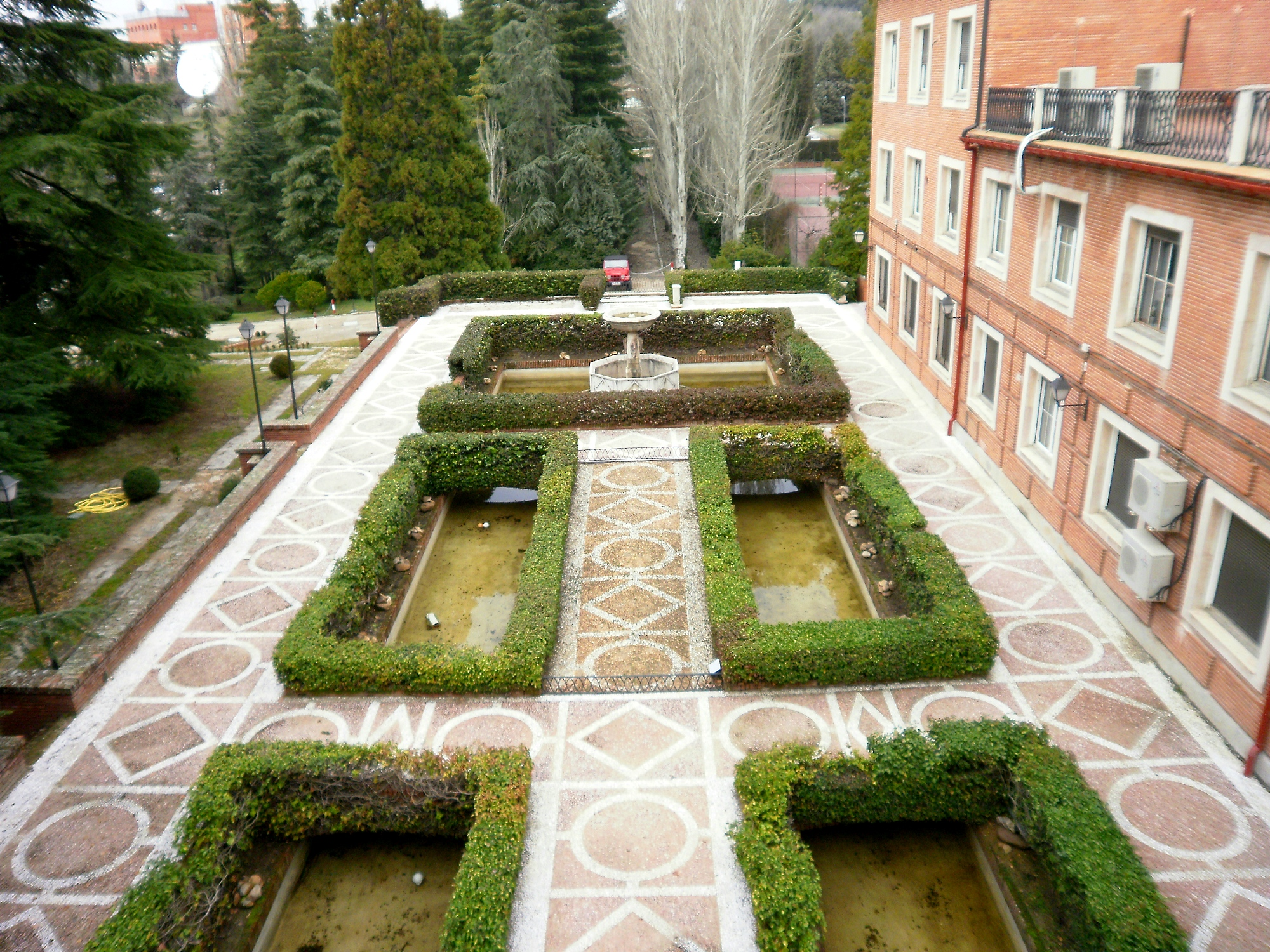 Jardín interior de la ETSI de Montes de la Universidad Politécnica de Madrid.